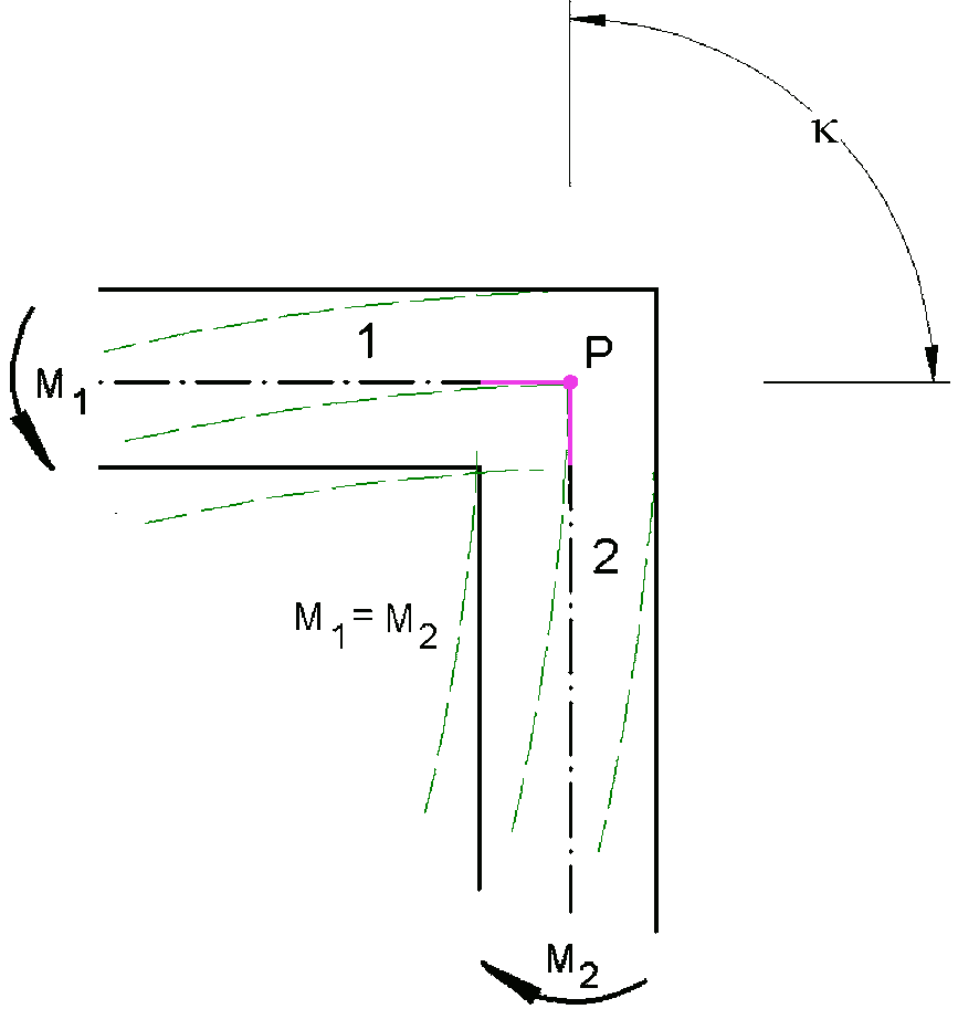 Baustatisches Modell "biegesteife Ecke"